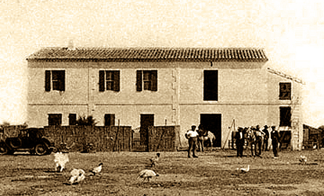 Mas du Simbeu, propriété du marquis Folco de Baroncelli-Javon en 1930